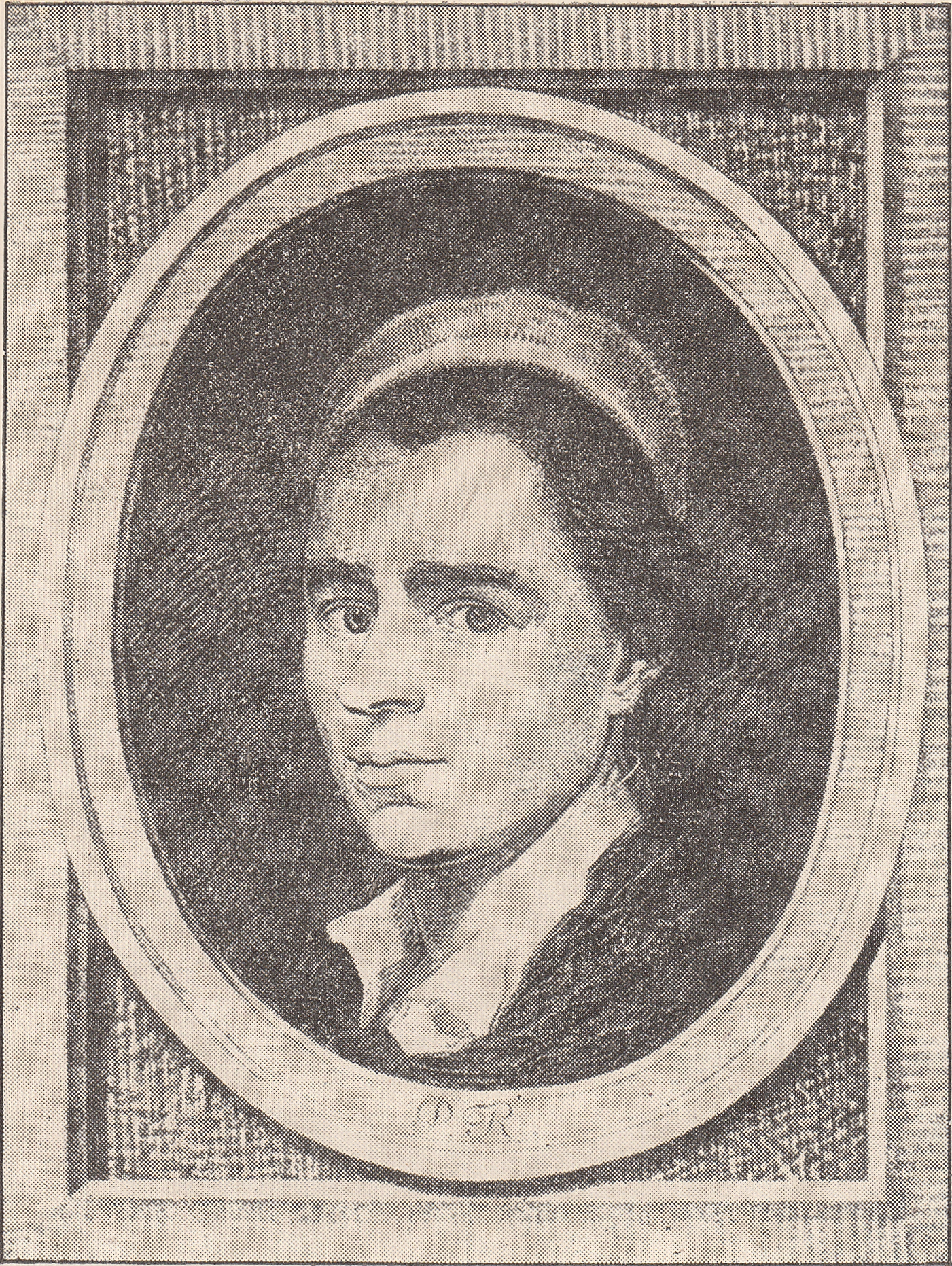 Heinrich Pallmann: Johann Gottlieb Prestel in Bibliothek für Volks- und Heimatkunde, Sonderheft zu den deutschen Gauen; G. Frank – Kaufbeuren